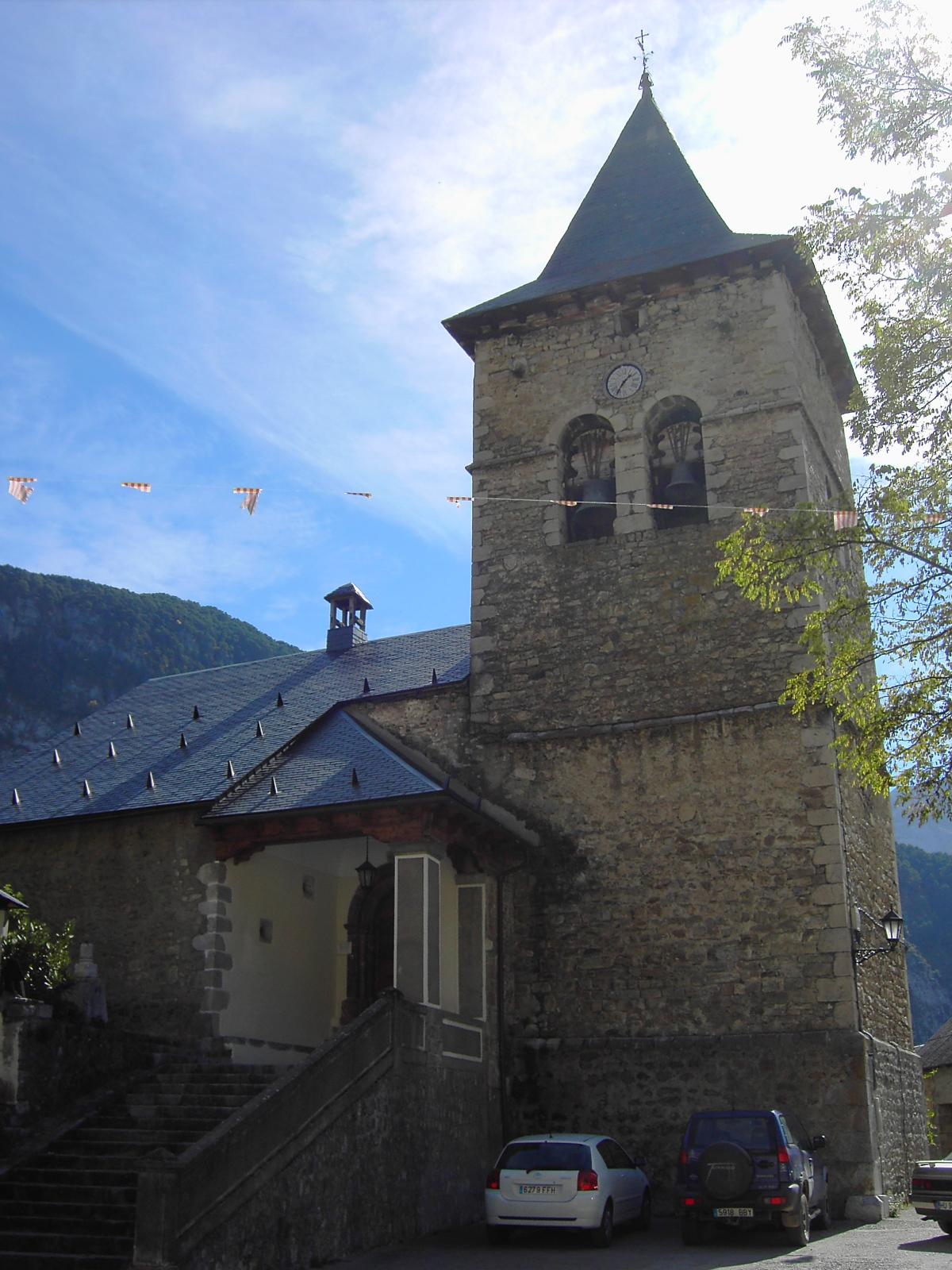 La iglesia parroquial de Sin (La Comuna, Huesca). Conserva una momia medieval en su interior.